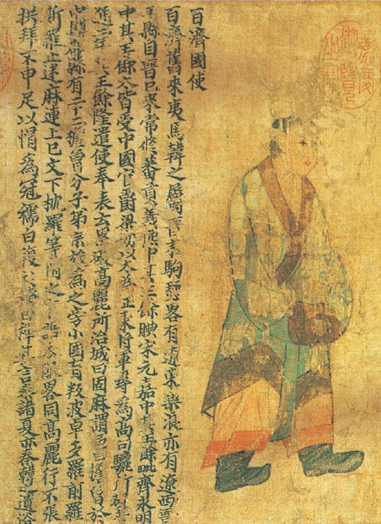 양직공도에 나타난 백제의 사신 ( 는 양나라의 원제(元帝)인 소역(蕭繹, 505∼554)이 제위(帝位)에 오르기 전인 형주자사(荊州刺史) 재임시(526∼539)에 편찬한 도서(圖書) 이다)